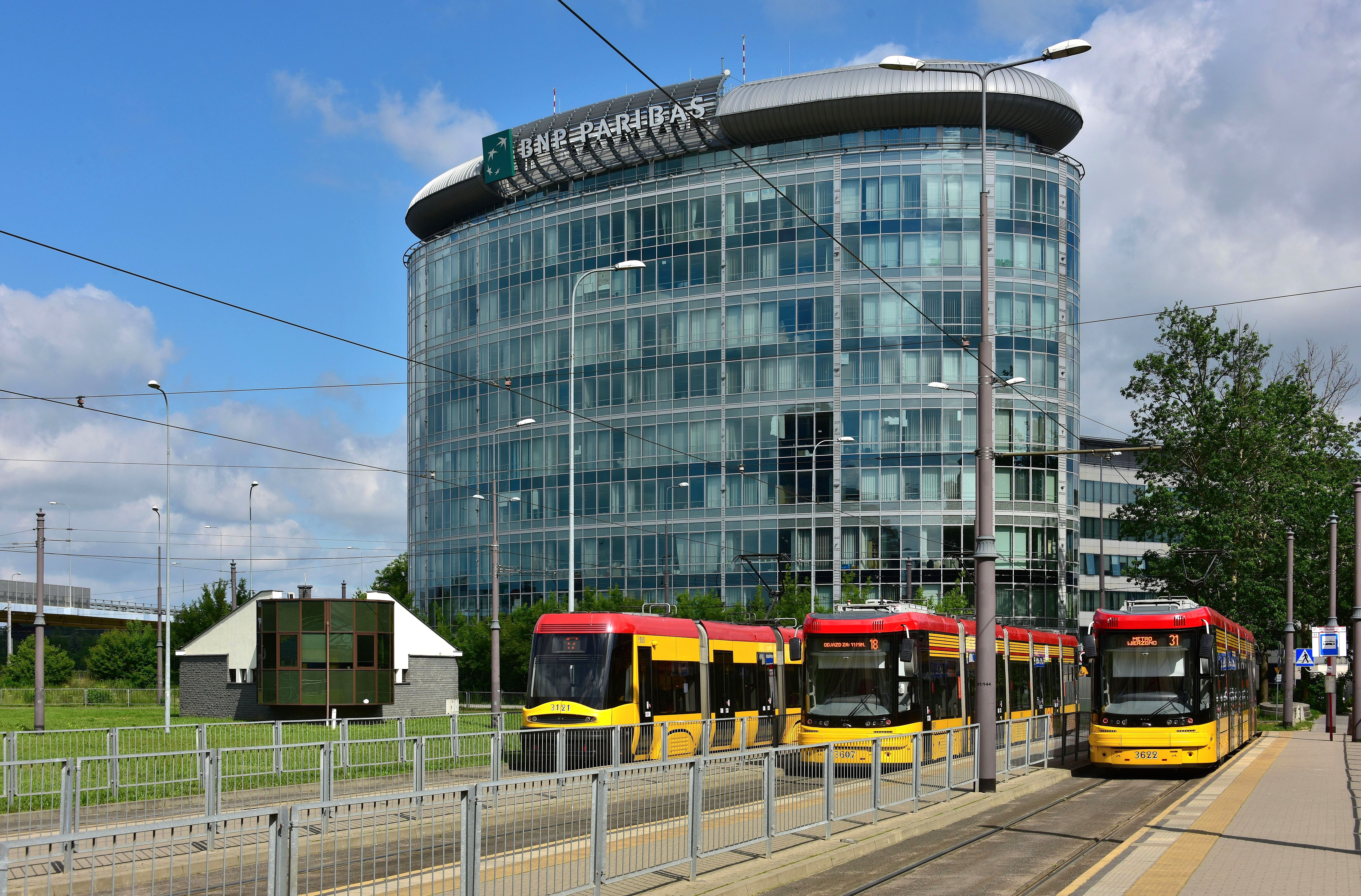 Pętla tramwajowa PKP Służewiec przy ul. Marynarskiej w Warszawie